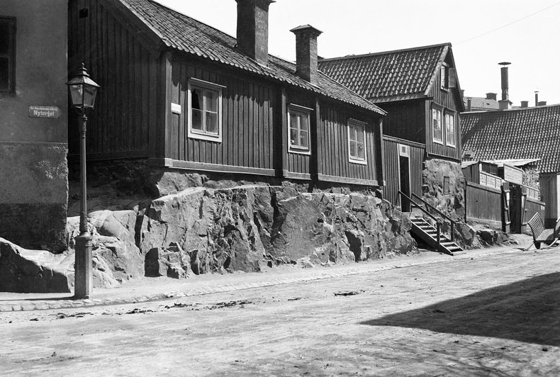 Fastigheten Bondesonen större 21, dagens Nytorget 7